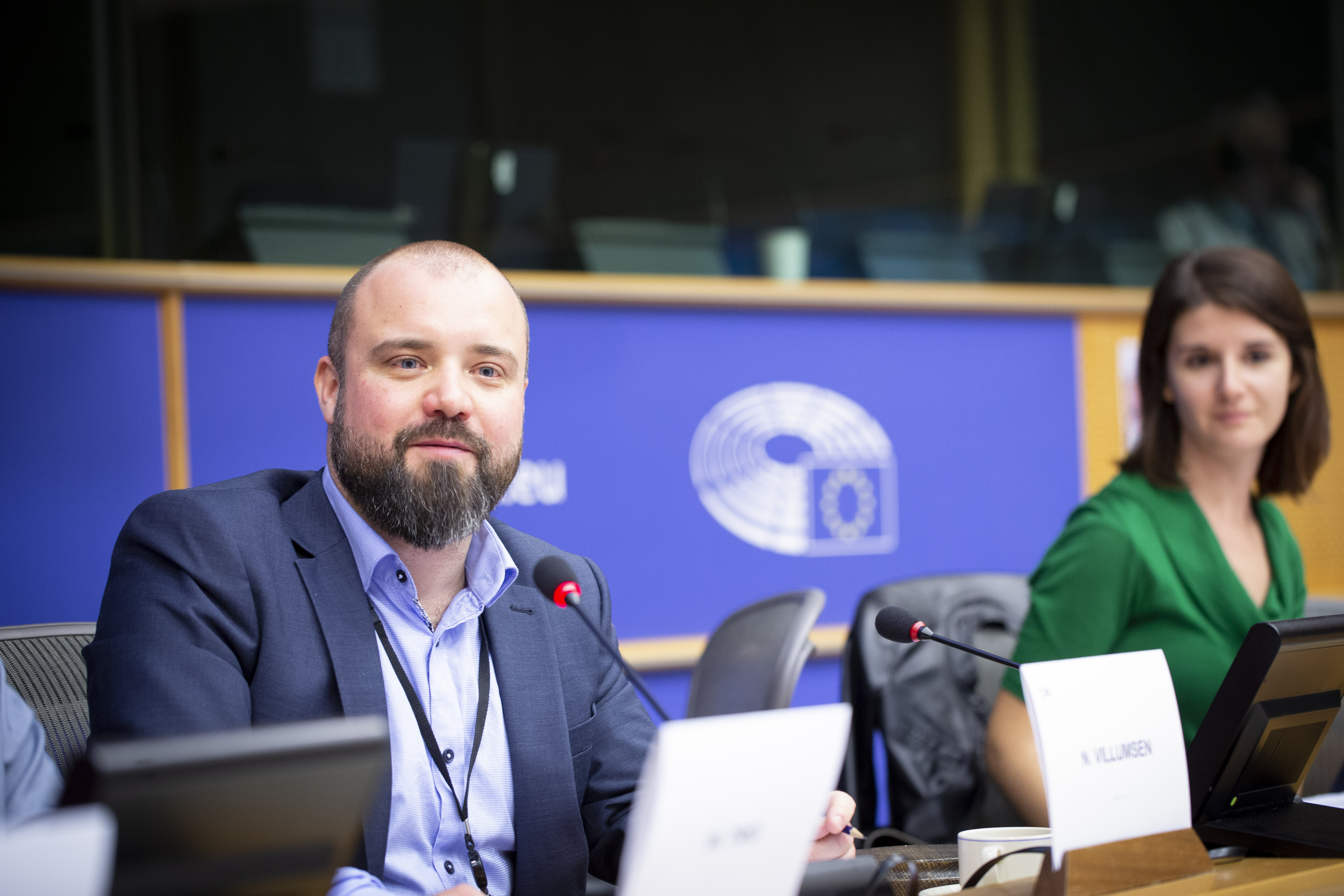 F70A9740